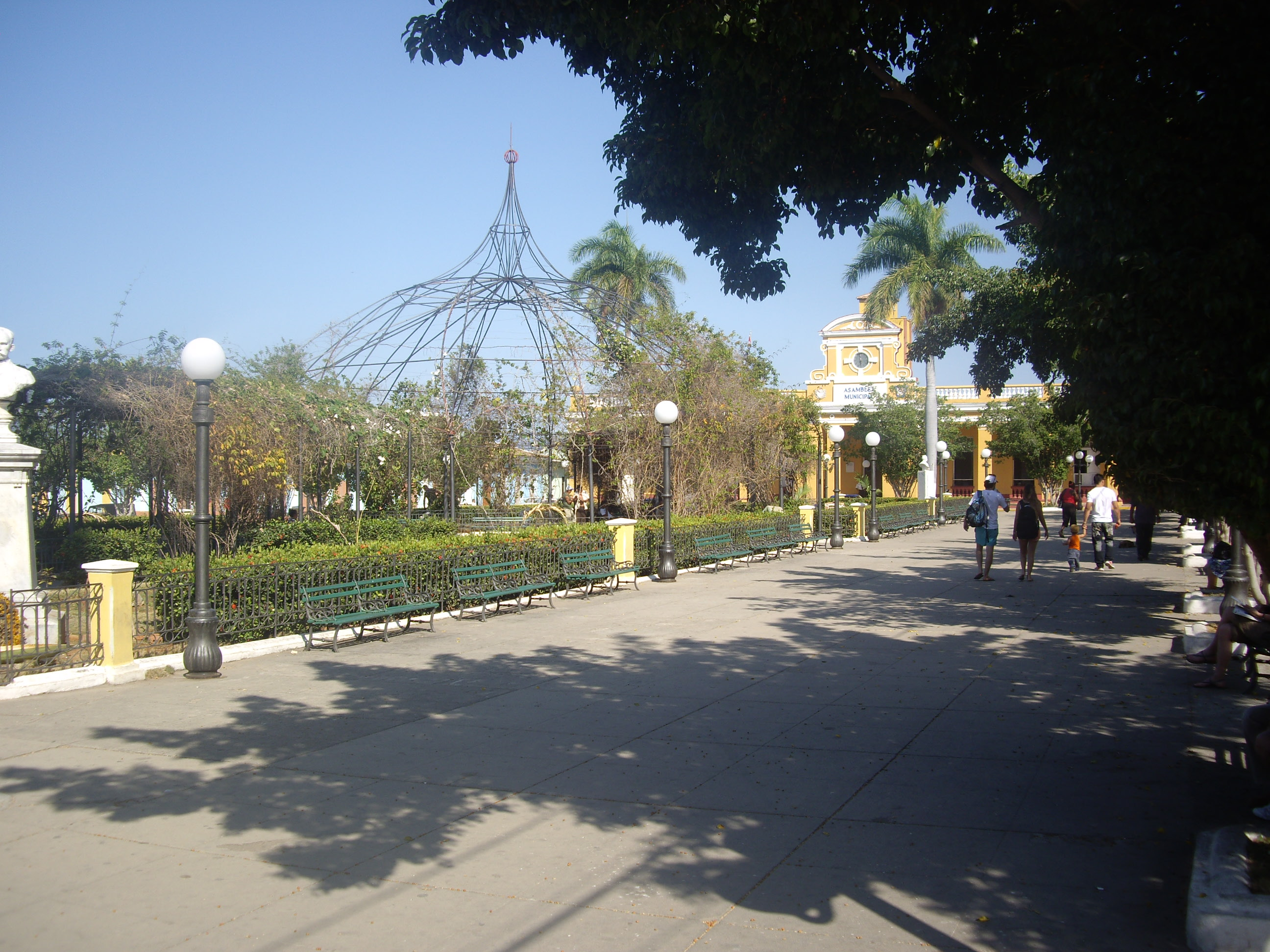 Plaça Carrillo a Trinidad, Cuba